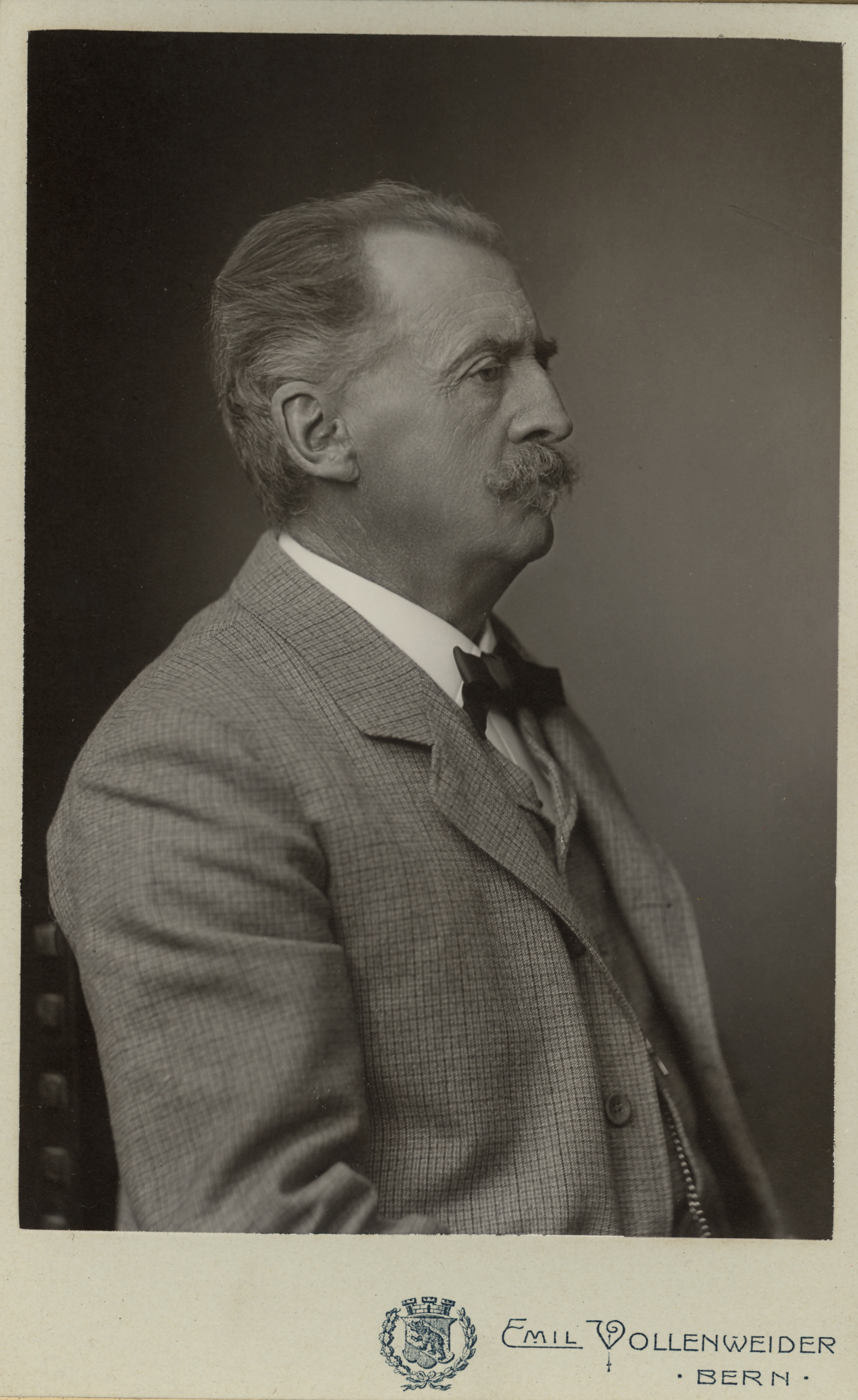 Philipp Gosset (1838-1911). Photo Emil Vollenweider 1909